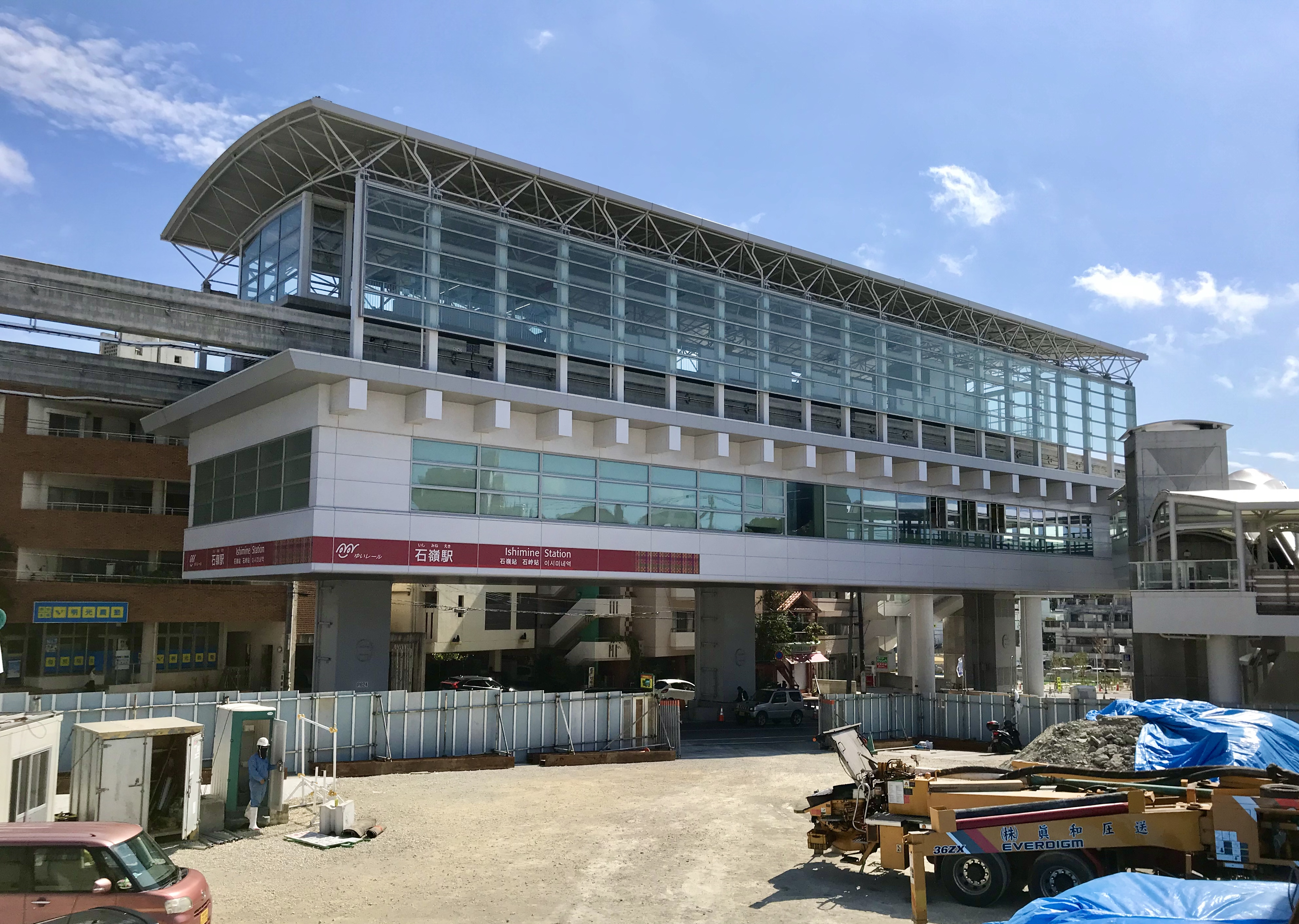 沖縄都市モノレール（ゆいレール）石嶺駅西口